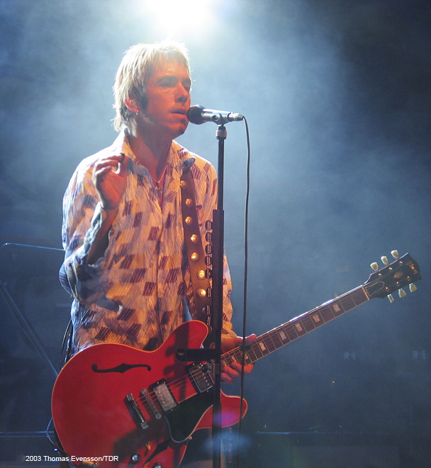 Per Gessle, live in Helsinki, Finland